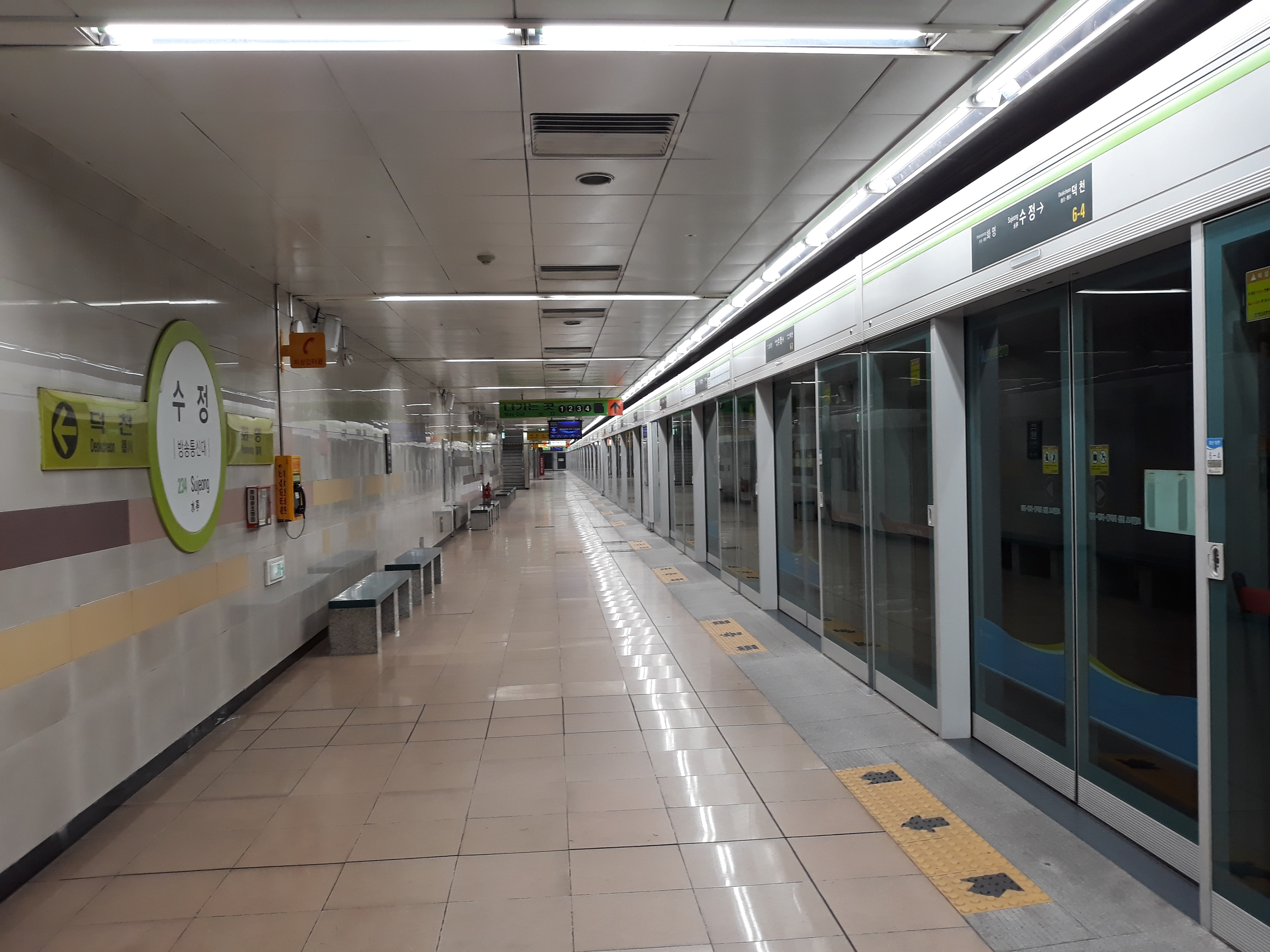 부산 도시철도 2호선 수정역 장산 방면 승강장